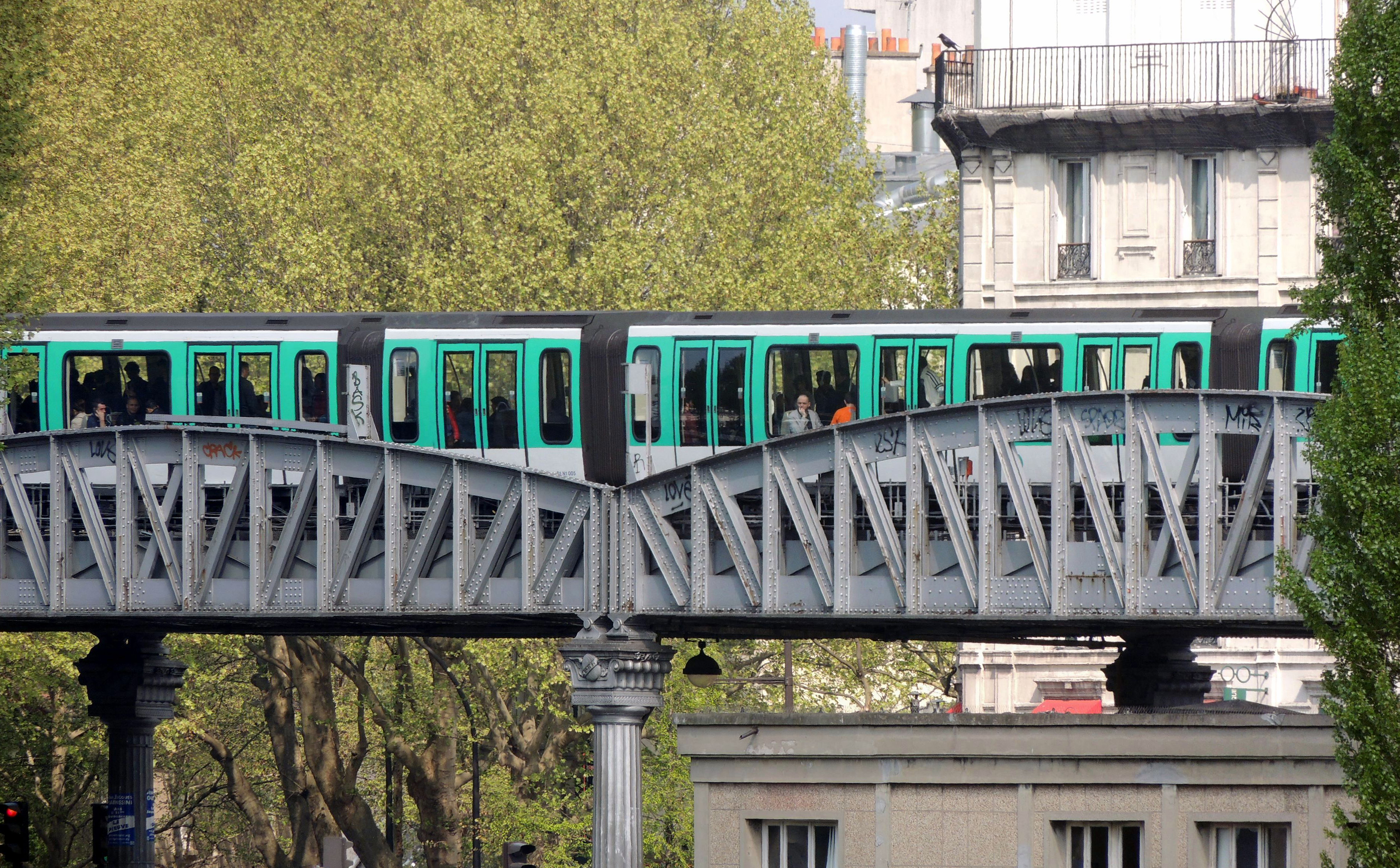 Paris zoom métro aérien station JAURèS-005